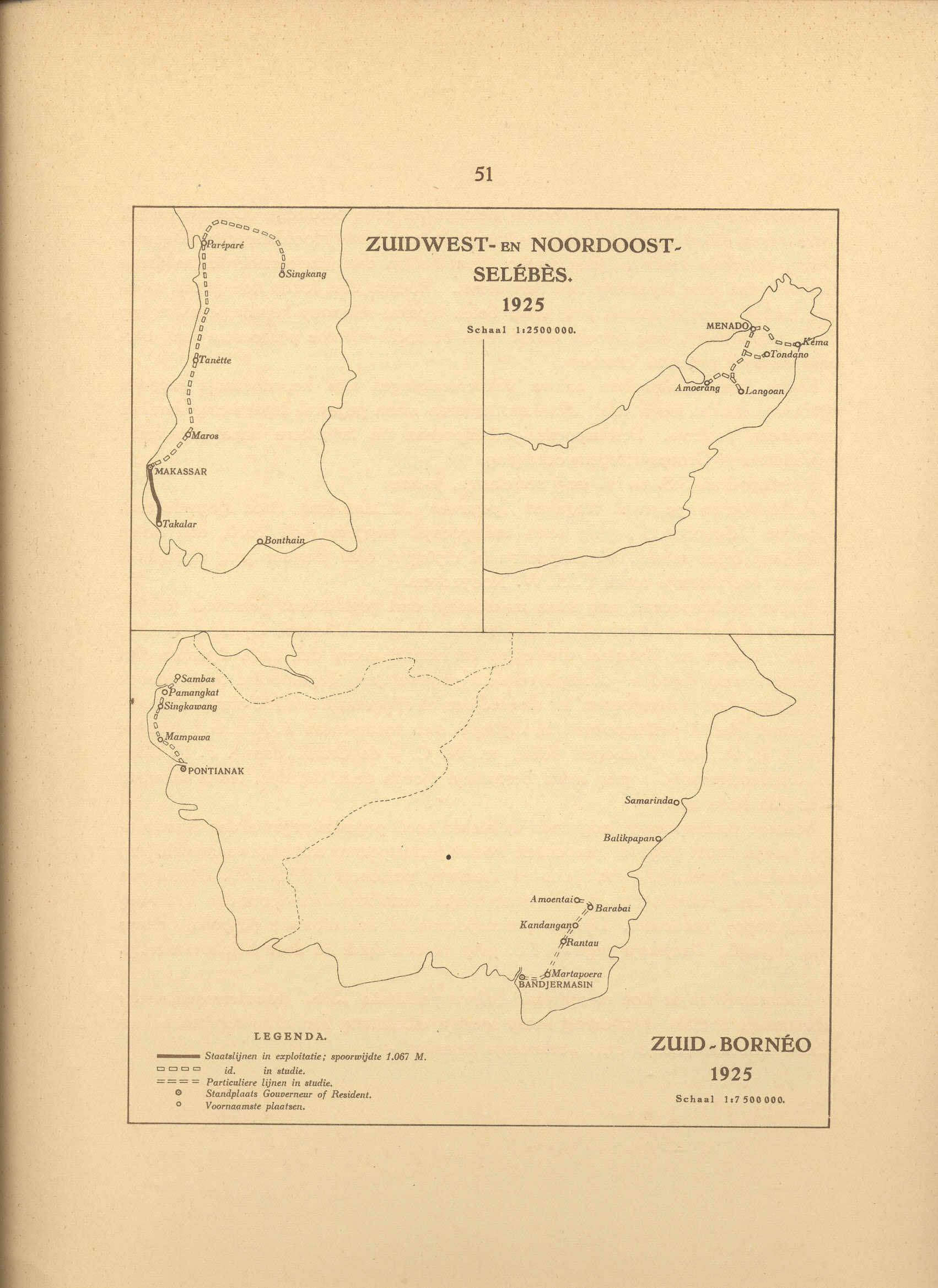 Peta tahun 1925 yang menunjukan jalur kereta api Makasar-Takalar dan beberapa rencana pembangunan jalur kereta api lainnya di pulau Kalimantan dan Sulawesi, namun semua jalur ditutup dan dibatalkan pembangunannya karena krisis ekonomi pada tahun 1933.